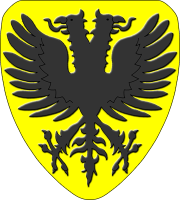 Armoiries de la commune belge de Frameries, blasonné d'or à l'aigle bicéphale de sable (la source dit « l'aigle éployée », la montre bicéphale et la nomme d'impériale (bicéphale), donc il y a erreur que je corrige ici dans le blasonnement)